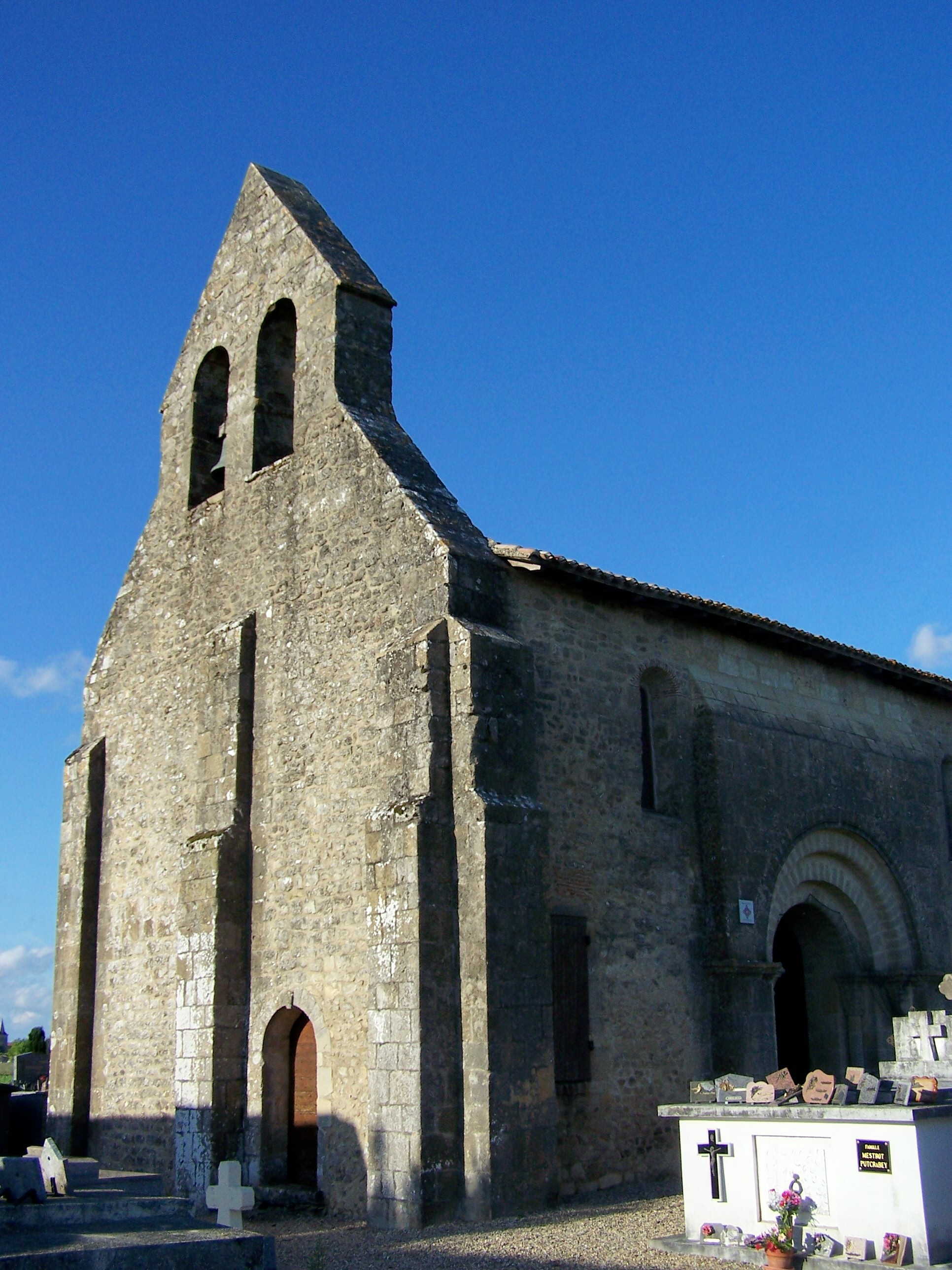 Église Saint-Martin-de-Montphélix à Pondaurat, Gironde, France